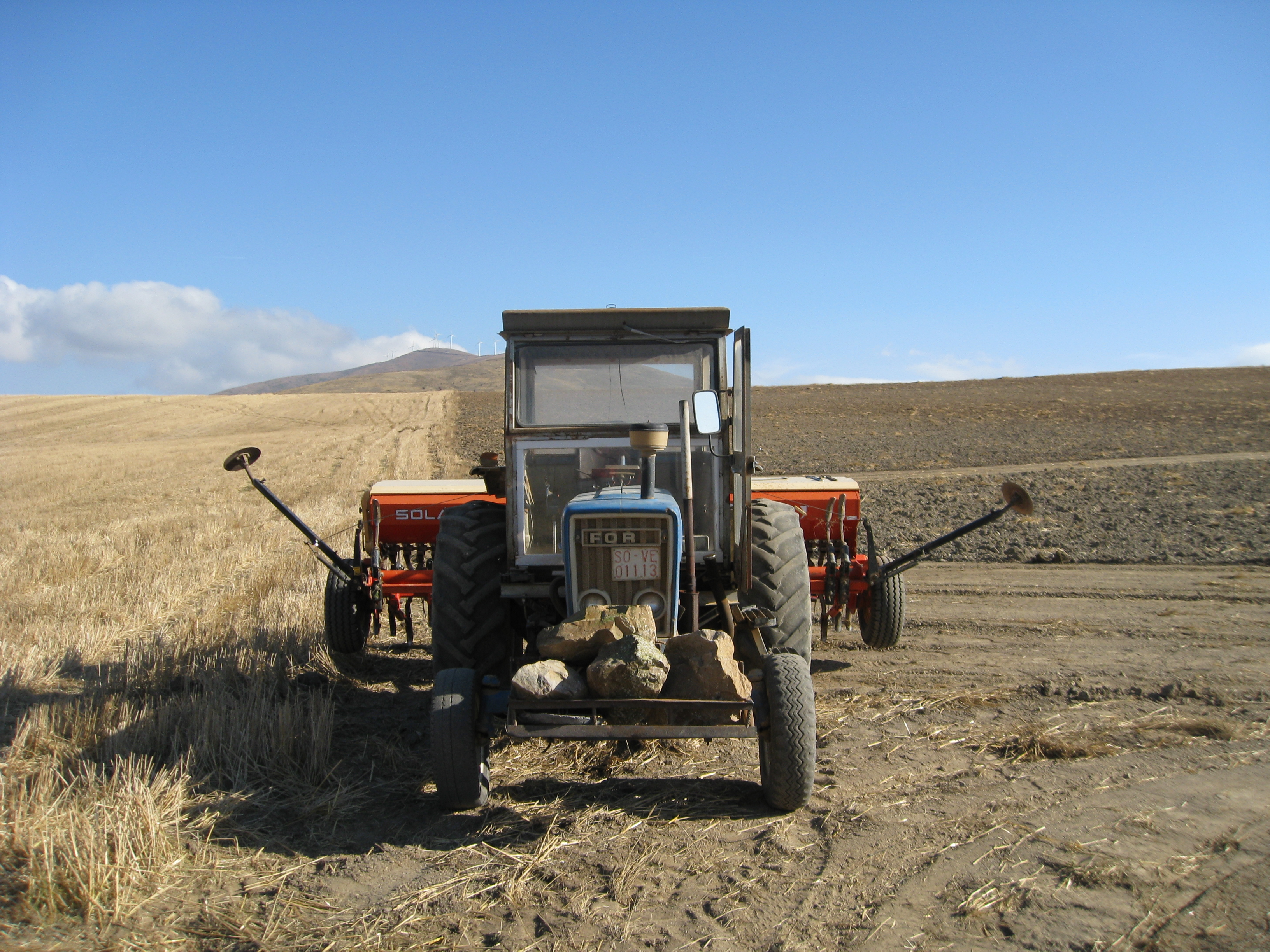 Foto de un ford 6600 con una sembradora de 4m